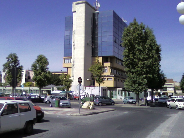 Fotografia personale scattata il 22/09/07 con cellulare Samsung SGH-Z230 e raffigurante il Palazzo Municipale di Quartu Sant'Elena